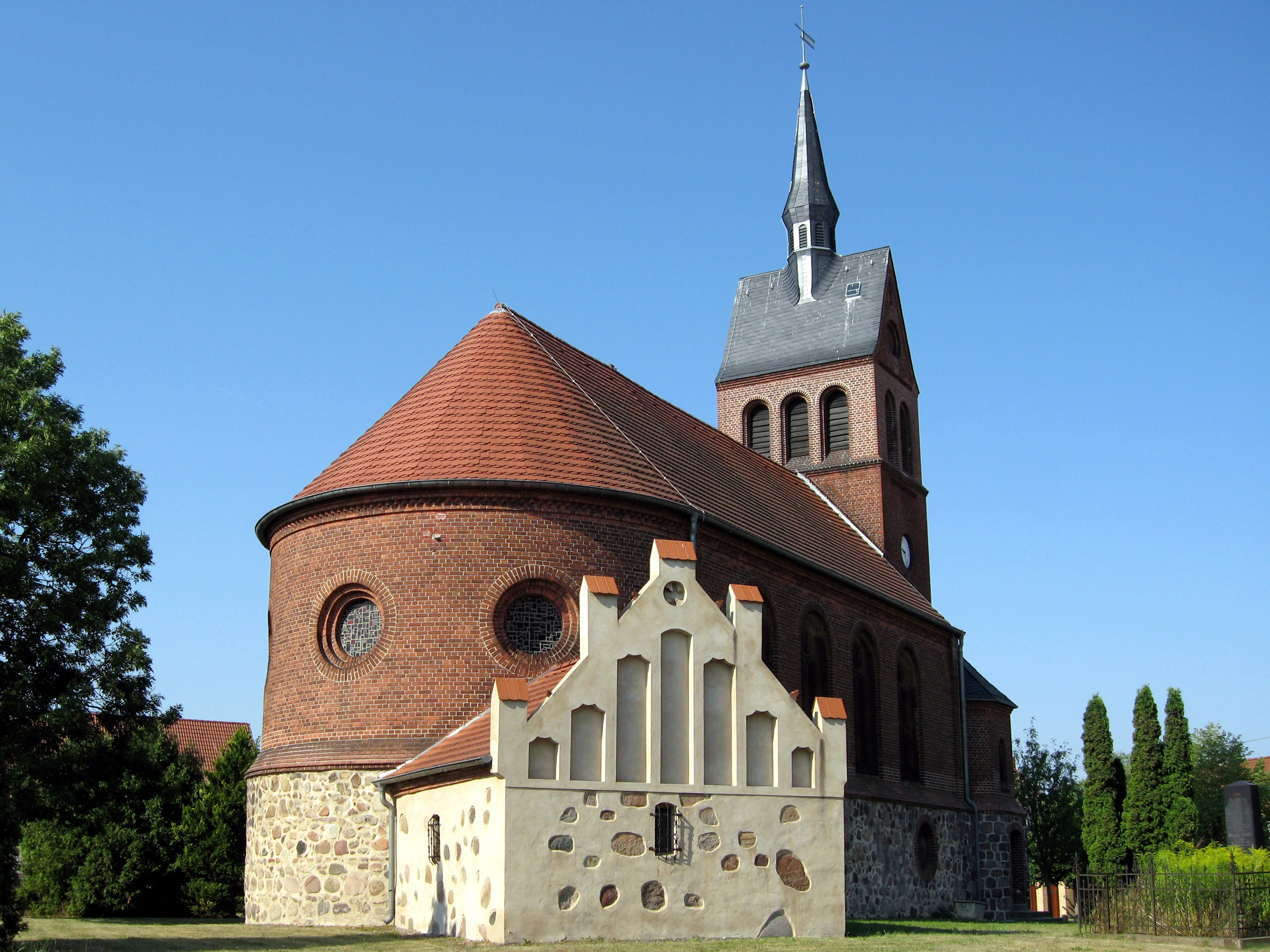 Kirche des Ortes Stolzenhagen in der Gemeinde Wandlitz, Landkreis Barnim, Land Brandenburg, Deutschland